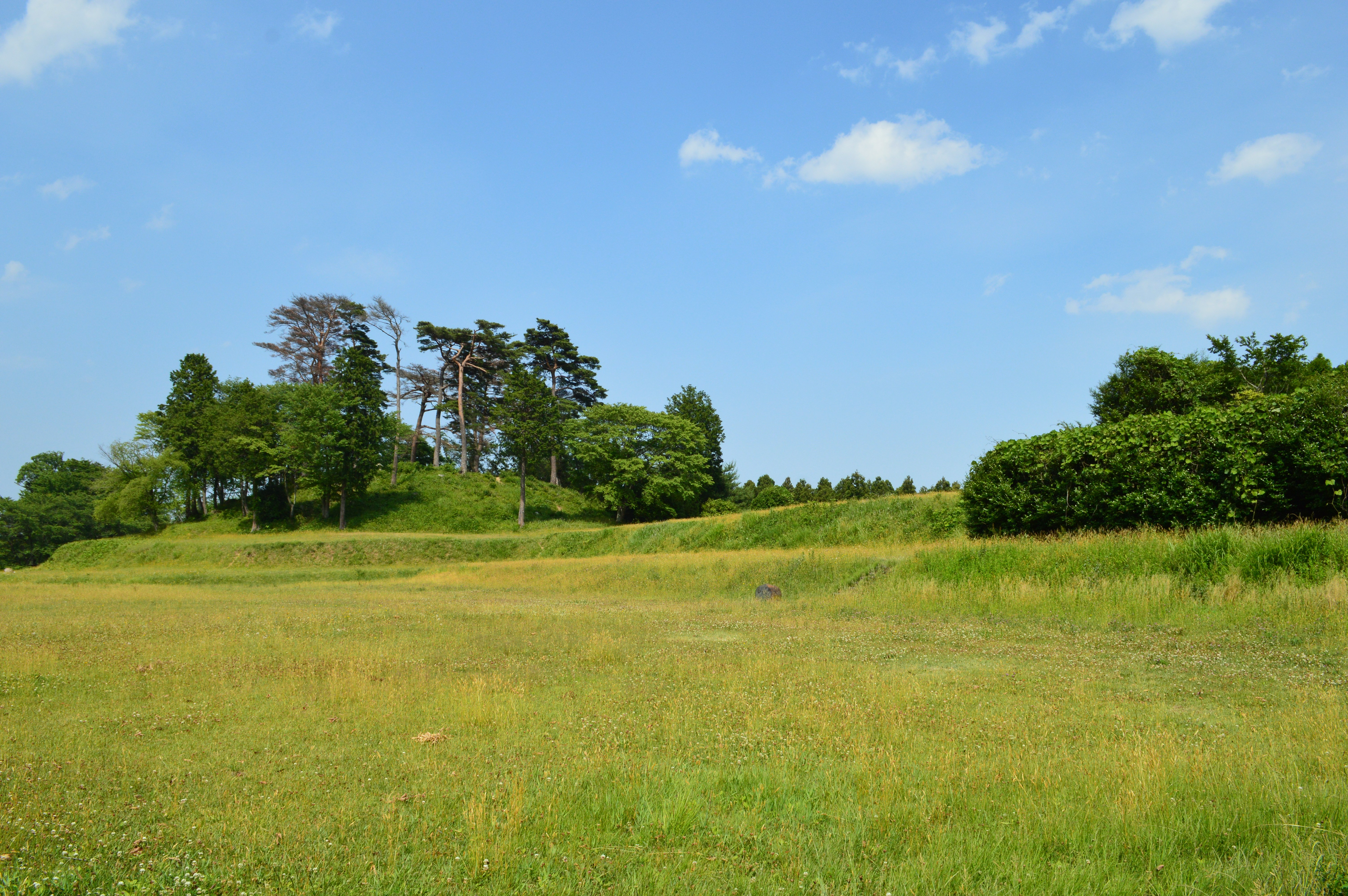 雷神山古墳 全景